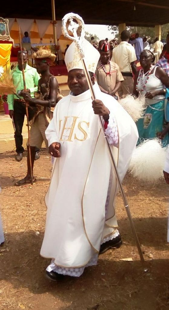 Biskup Philip Davou Dung